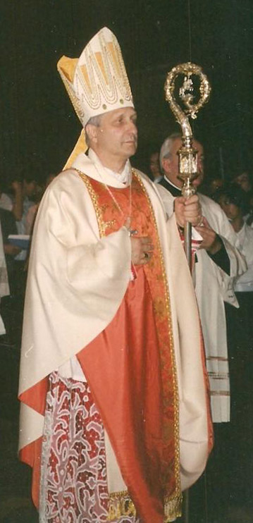 Luciano Monari - Vescovo di Brescia